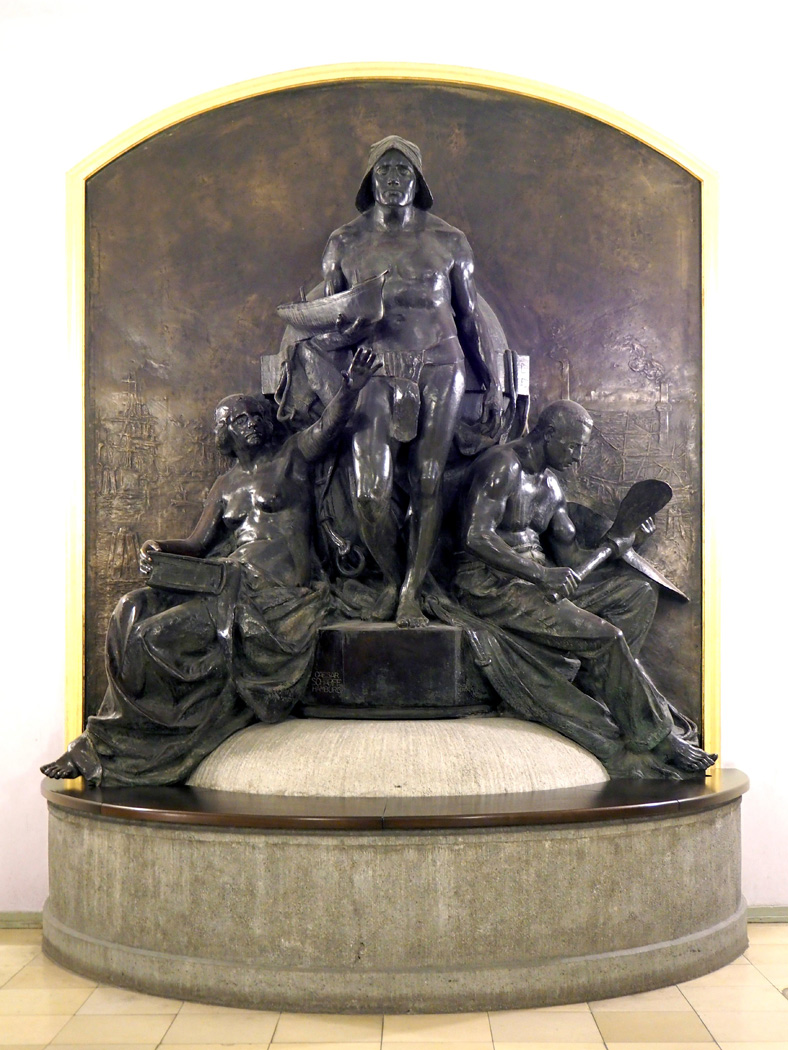 Hamburg-Altstadt, Denkmal im Laeiszhof, Foto 2015